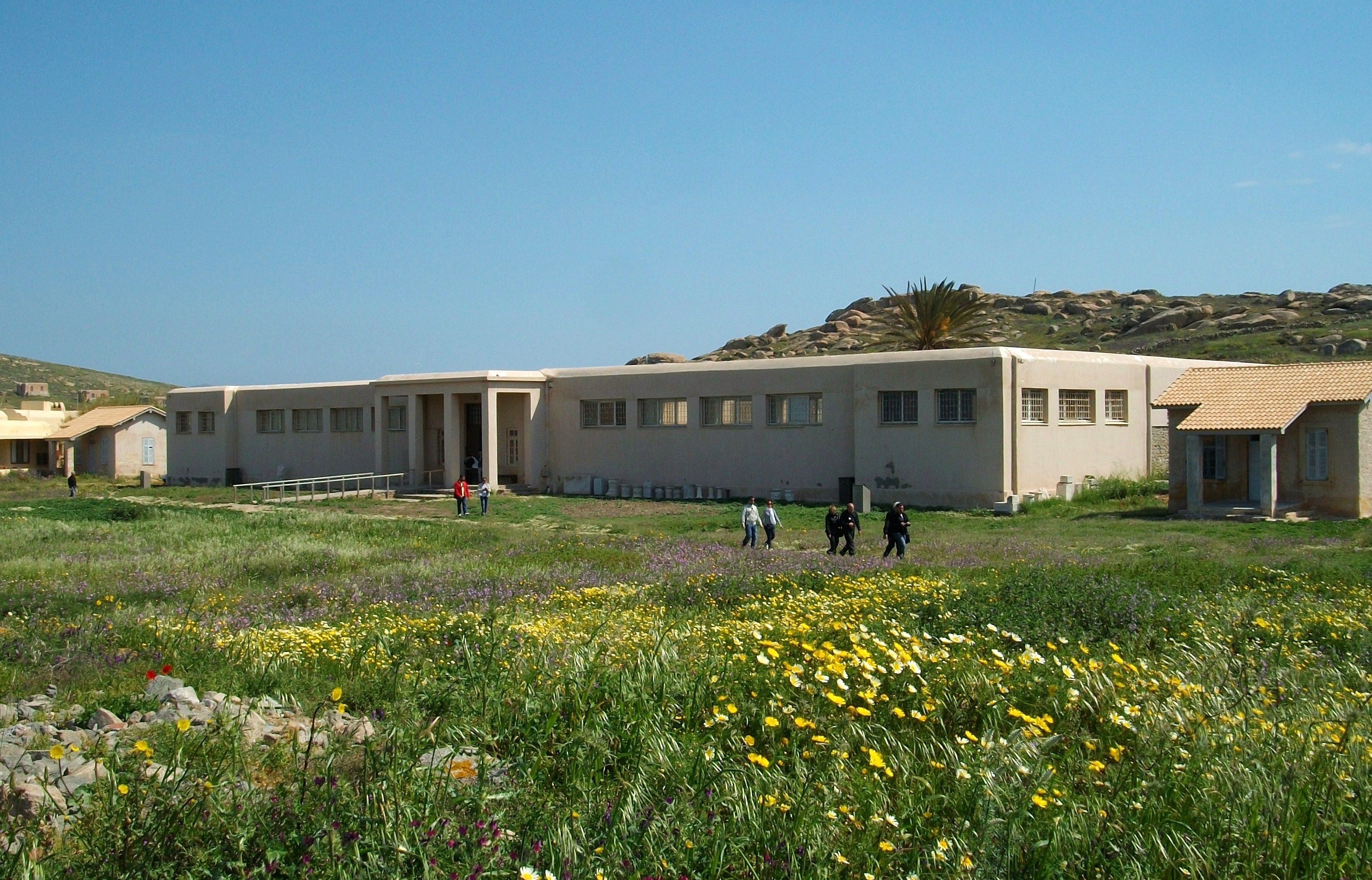 Exterior del Museu Arqueològic de Delos.